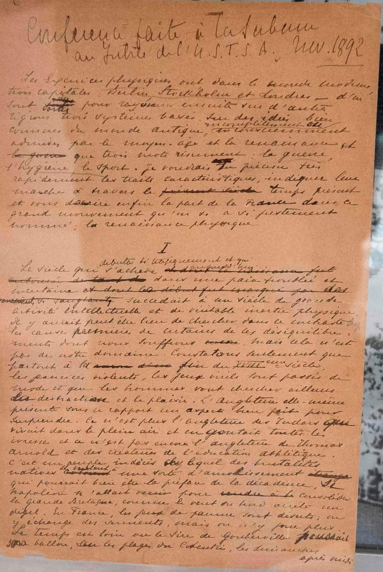 Page 1 d'un document de 14 pages